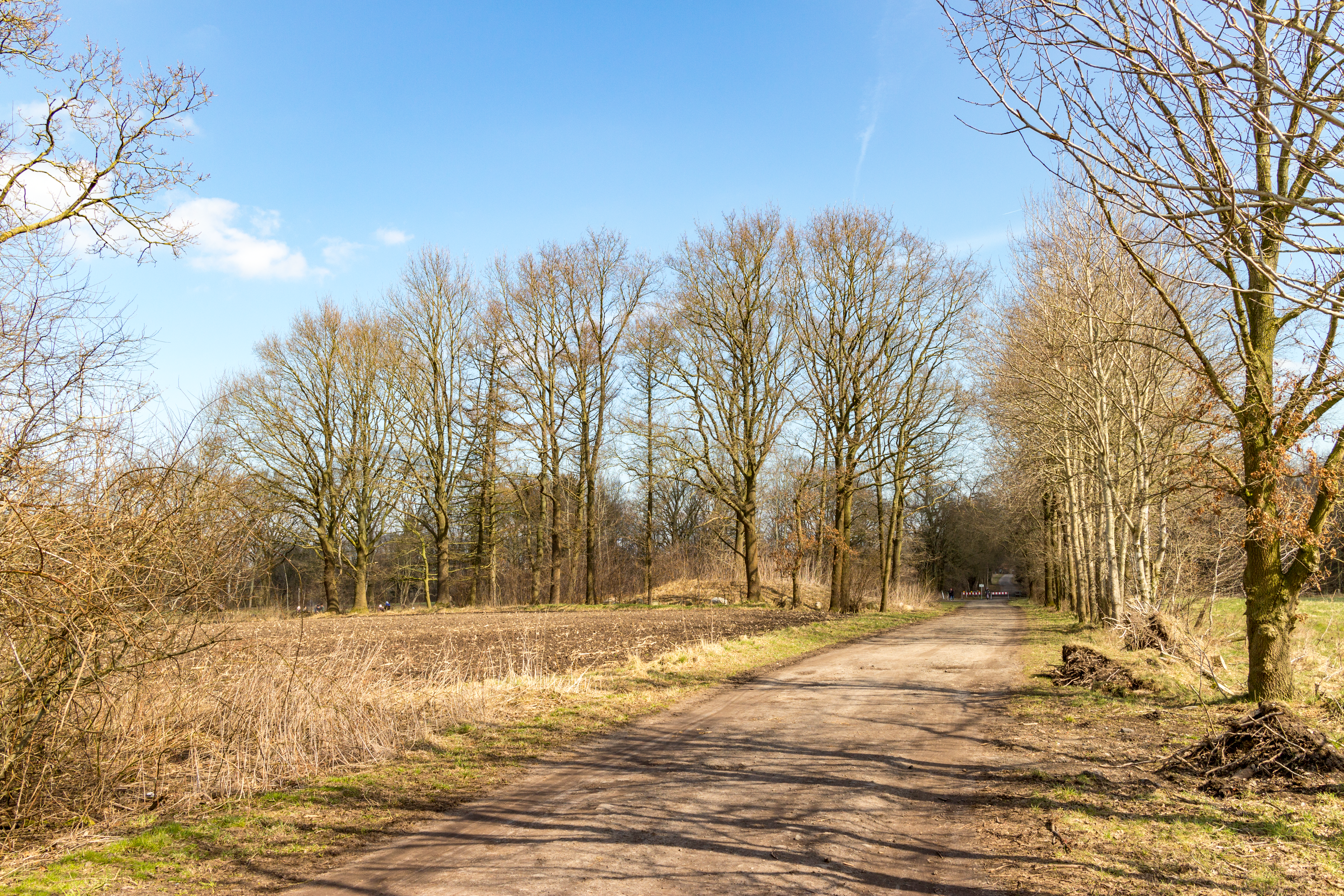 ehemalige Richstätte bei Stade